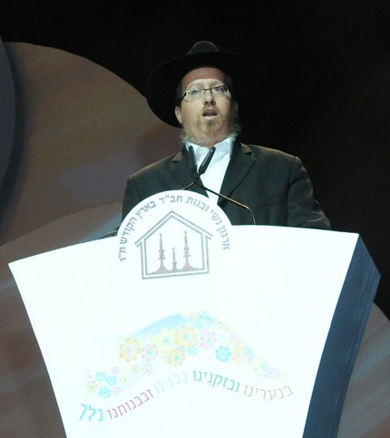 הרב זושא וולף בהרצאה בכנס של נשי חבד